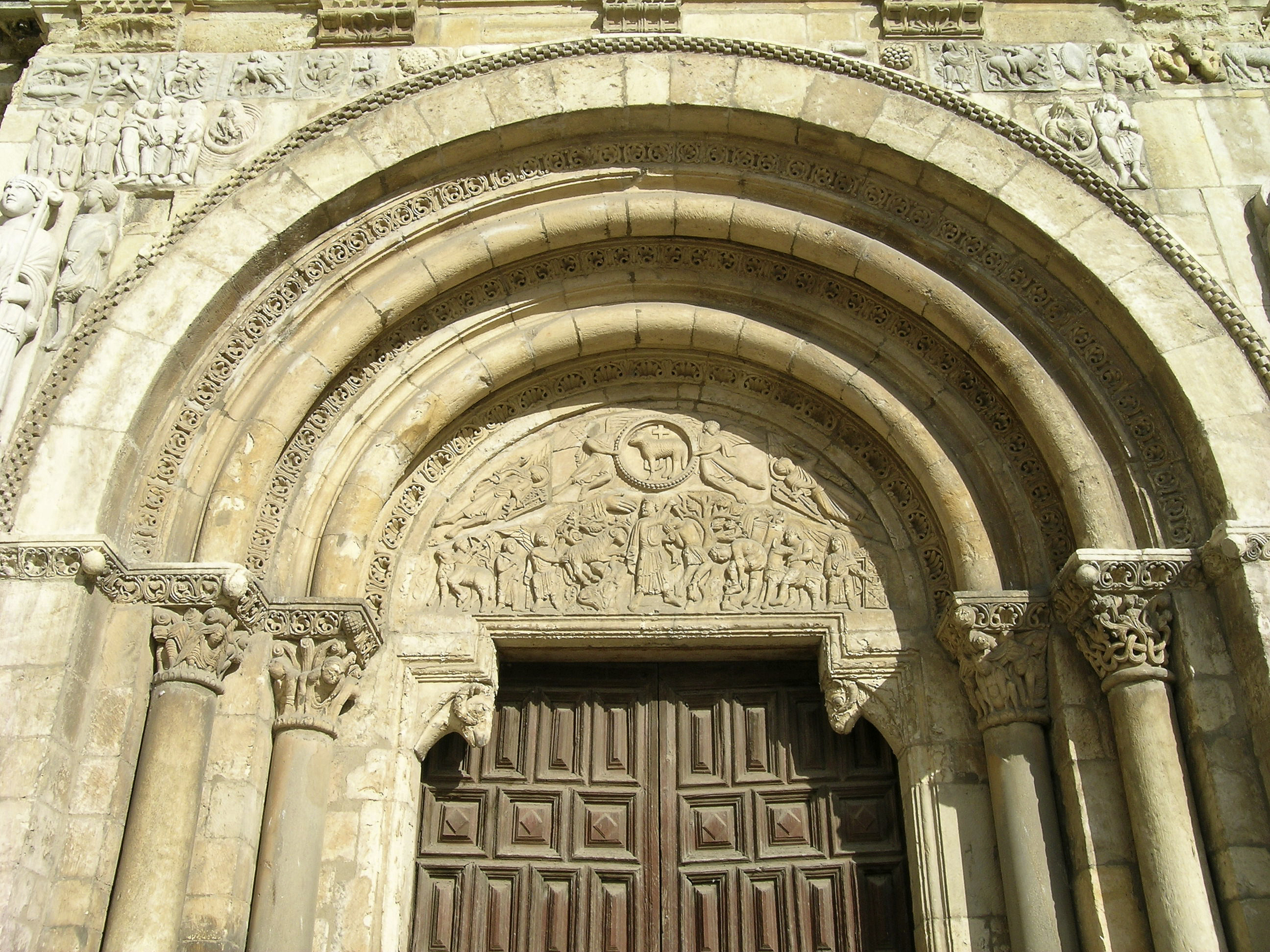 Puerta del Cordero, románica, de la Basílica de San Isidoro de León (Castilla y León, España). Detalle del tímpano, mochetas con cabeza de carnero y capiteles.